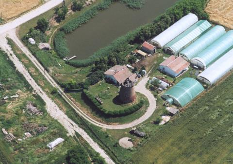 Tiszasziget, Hungary, aerialphotgraphy